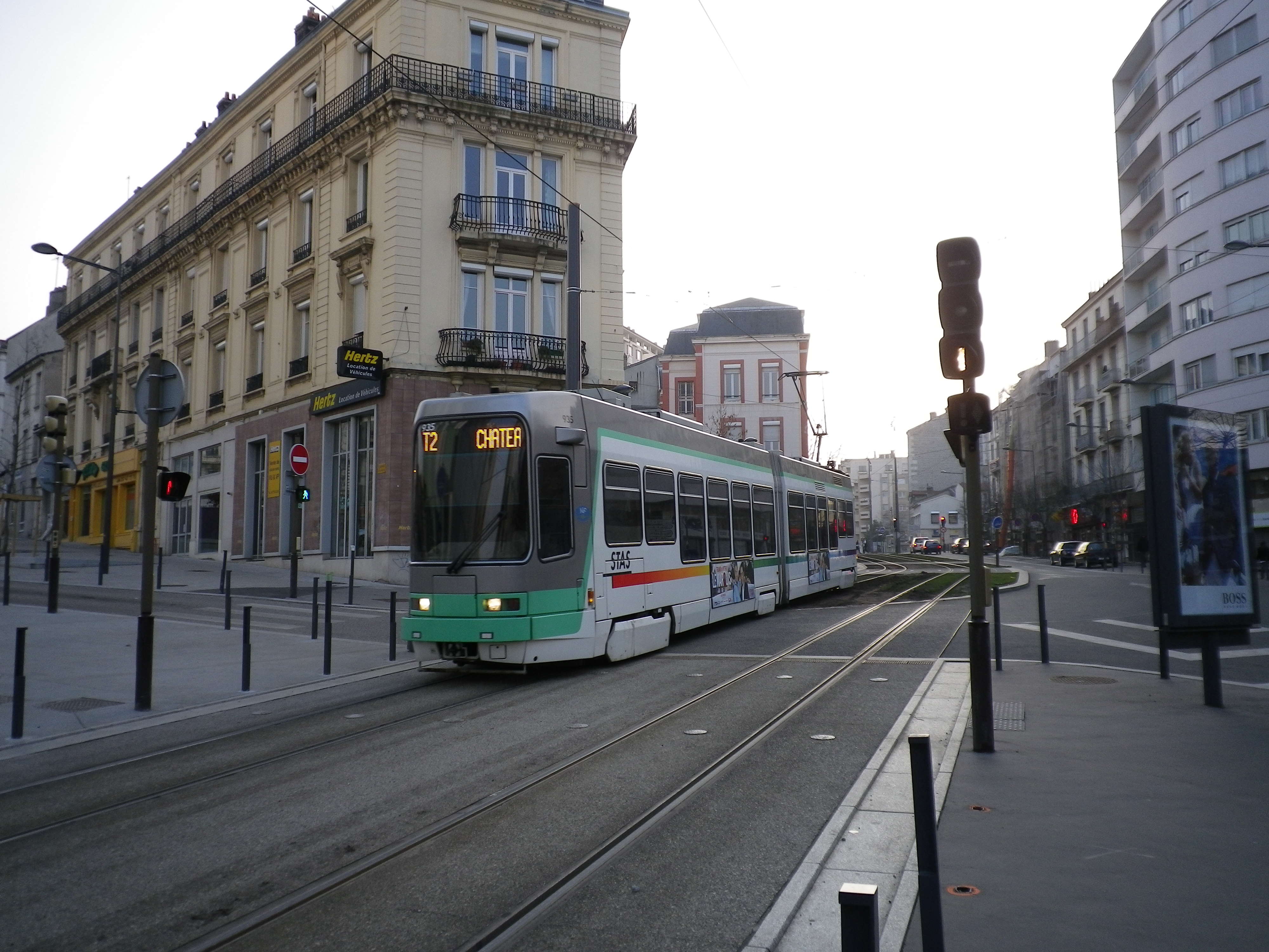 Tramway Vevey-Alsthom - Ligne T2 du réseau STAS - Saint-Etienne, à Dalgabio.Pentax Optio H90